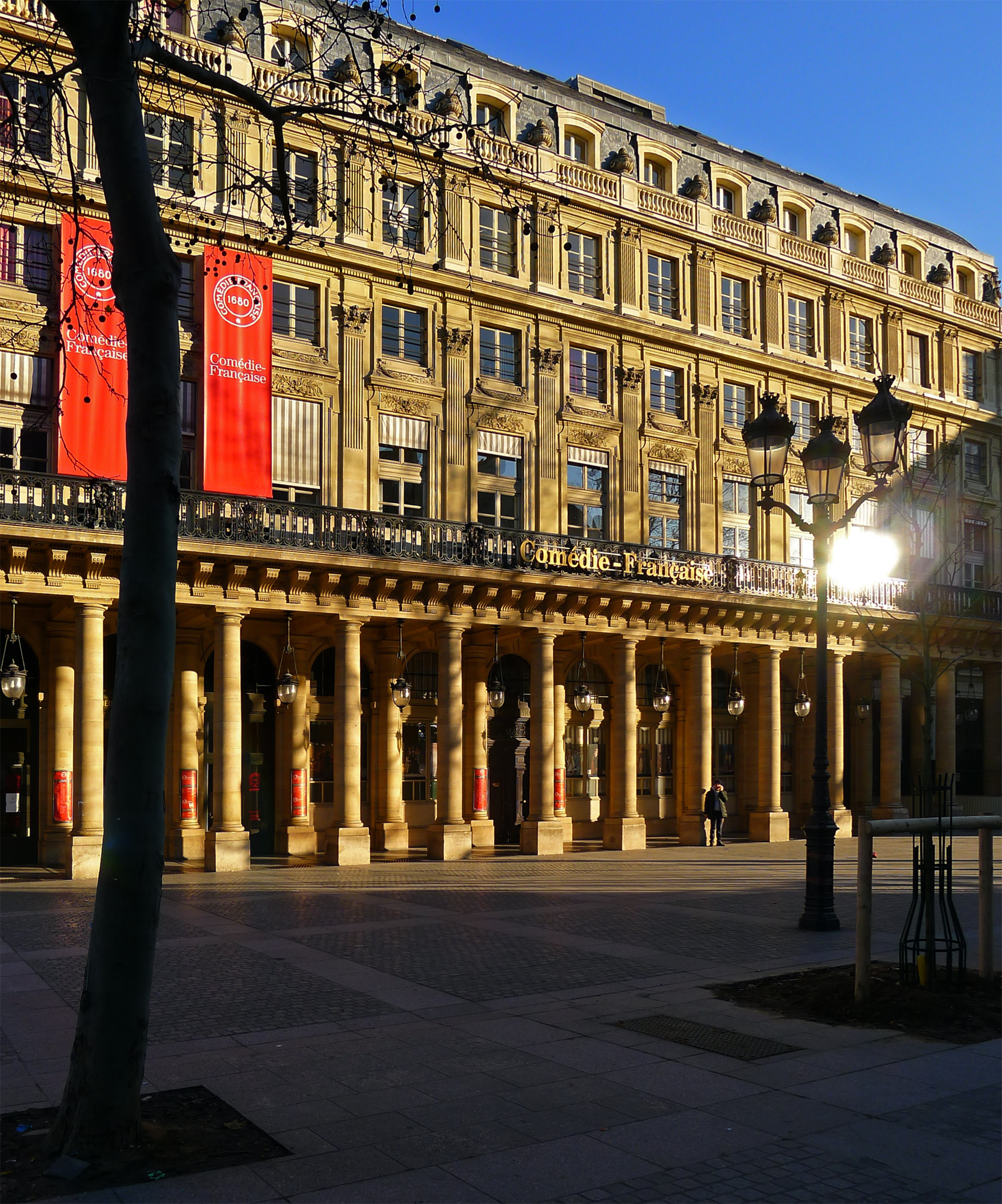 Comédie Française sur la place Colette - Paris Ier